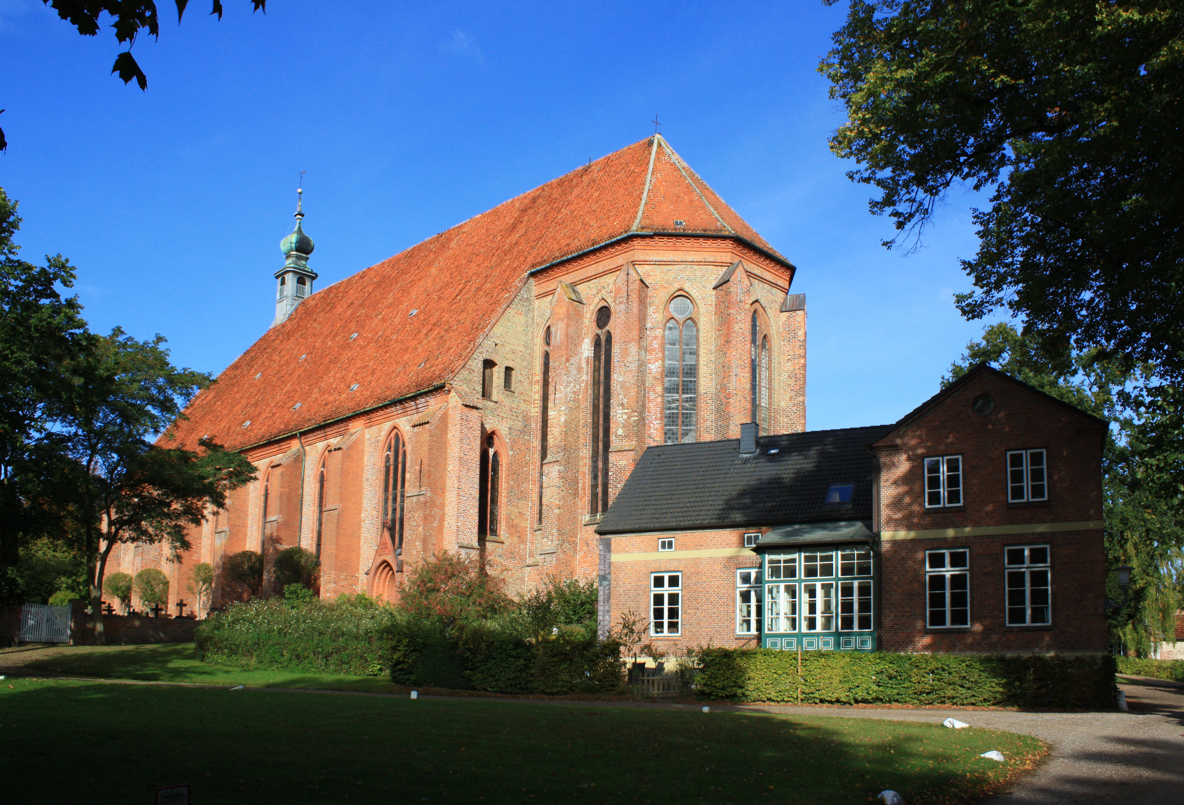 Klosterkirche von Kloster Preetz, Klosterhof, Preetz. No 11-1